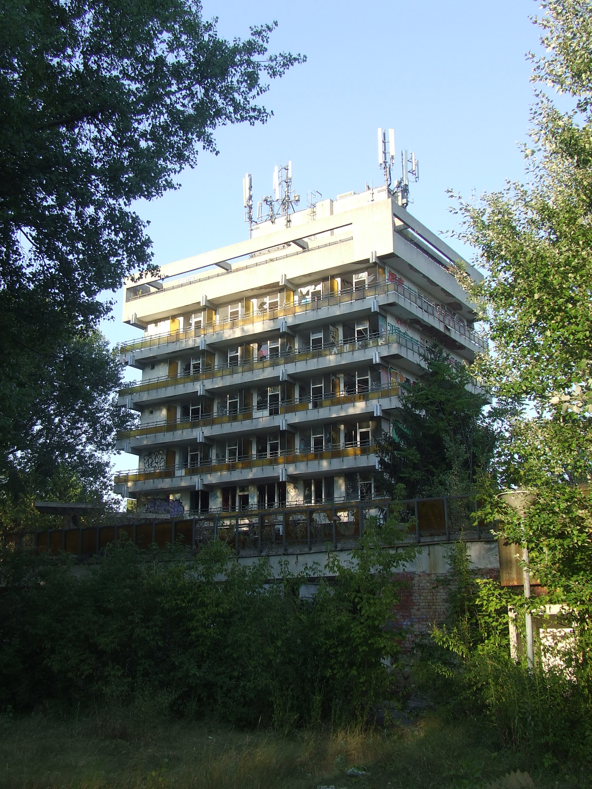 Postás üdülő, Budapest, Római-part